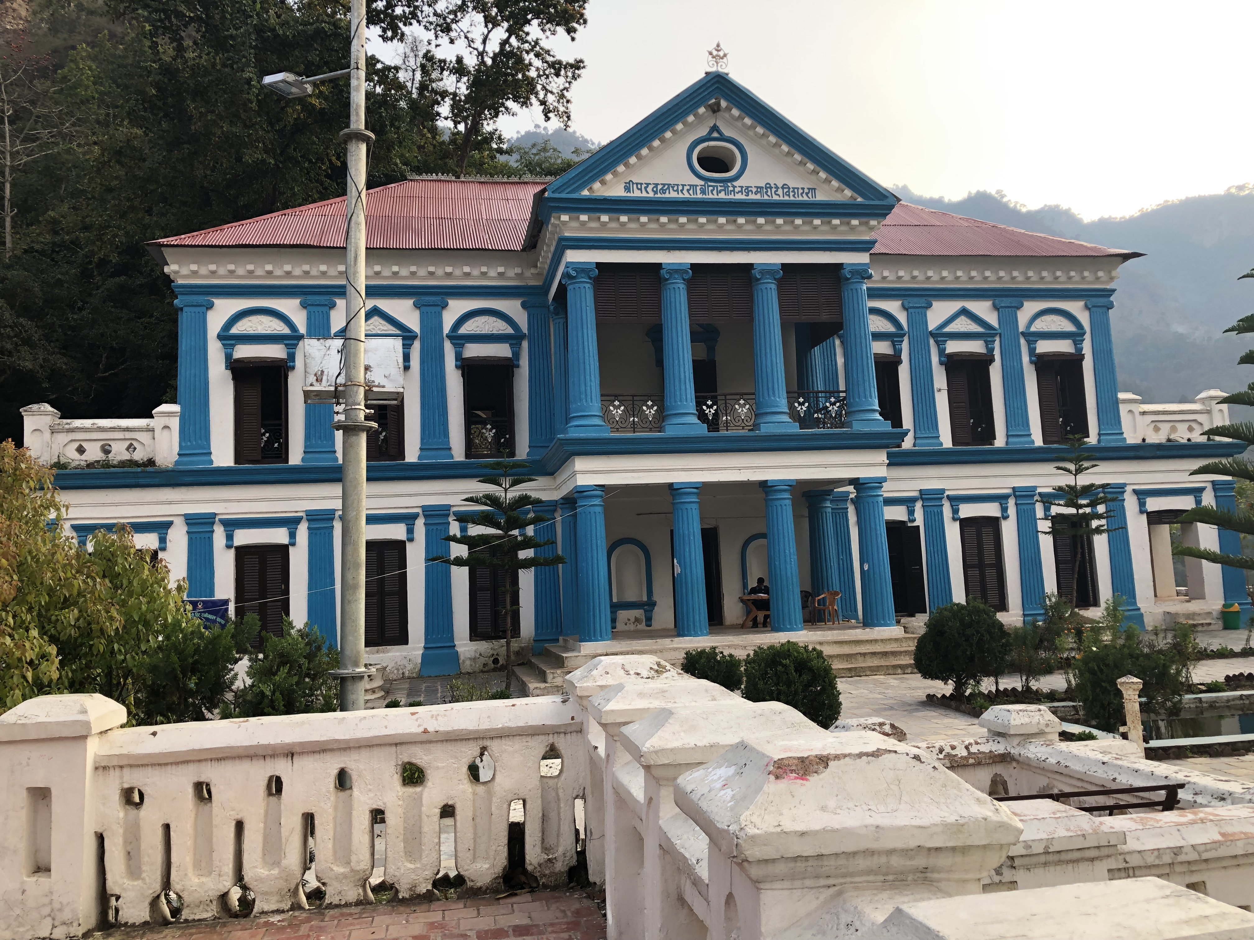 नेपाली: रानिमहलको अगाडीको दृश्य